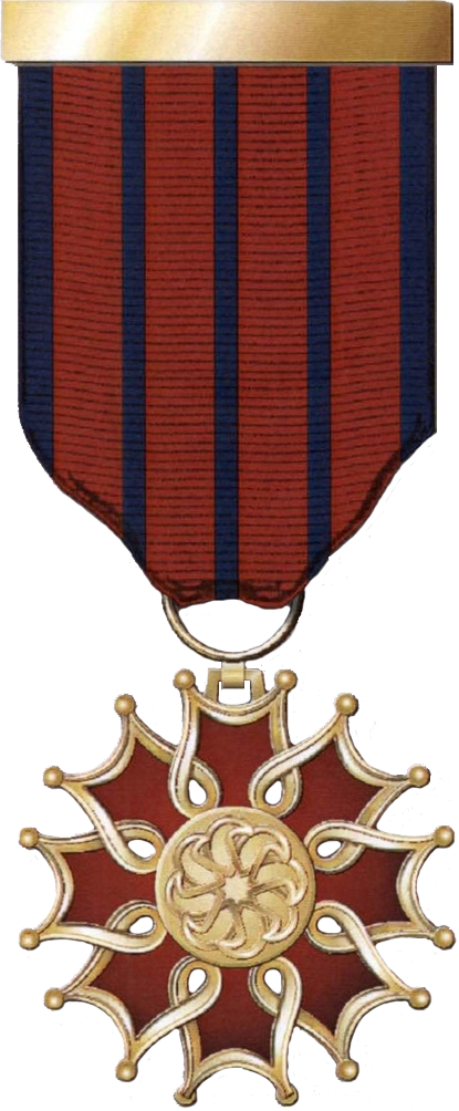 Azərbaycan Respublikası fəxri adının döş nişanı